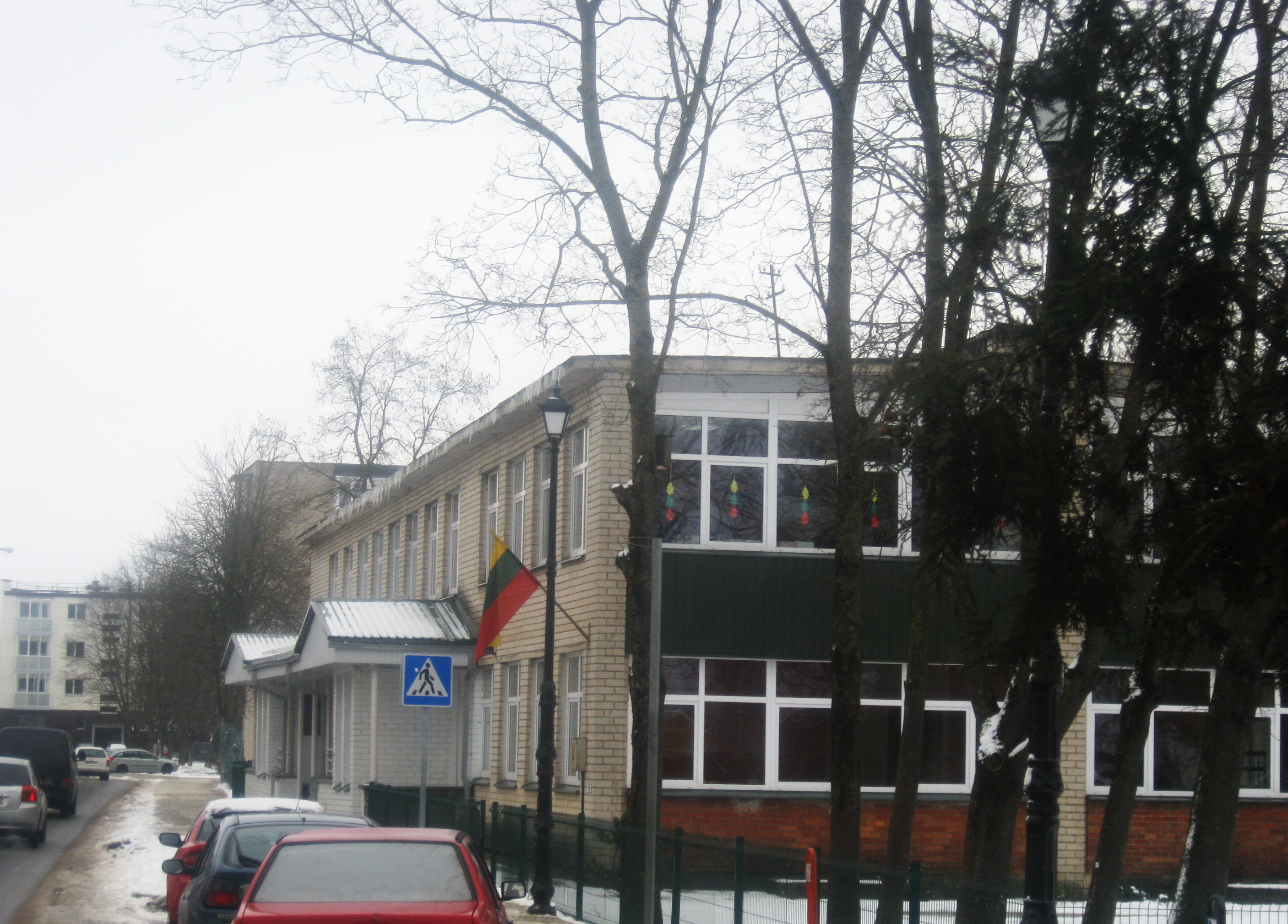 Jonavos Panerio pradinė mokykla